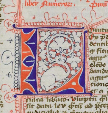 Utrechtse draakje, bepaalde boekverluchting, karakteristiek is dat deze draakjes in de late middeleeuwen, en mogelijk ook nog wel wat langer, in de stad Utrecht in handversierde initialen werden toegepast.